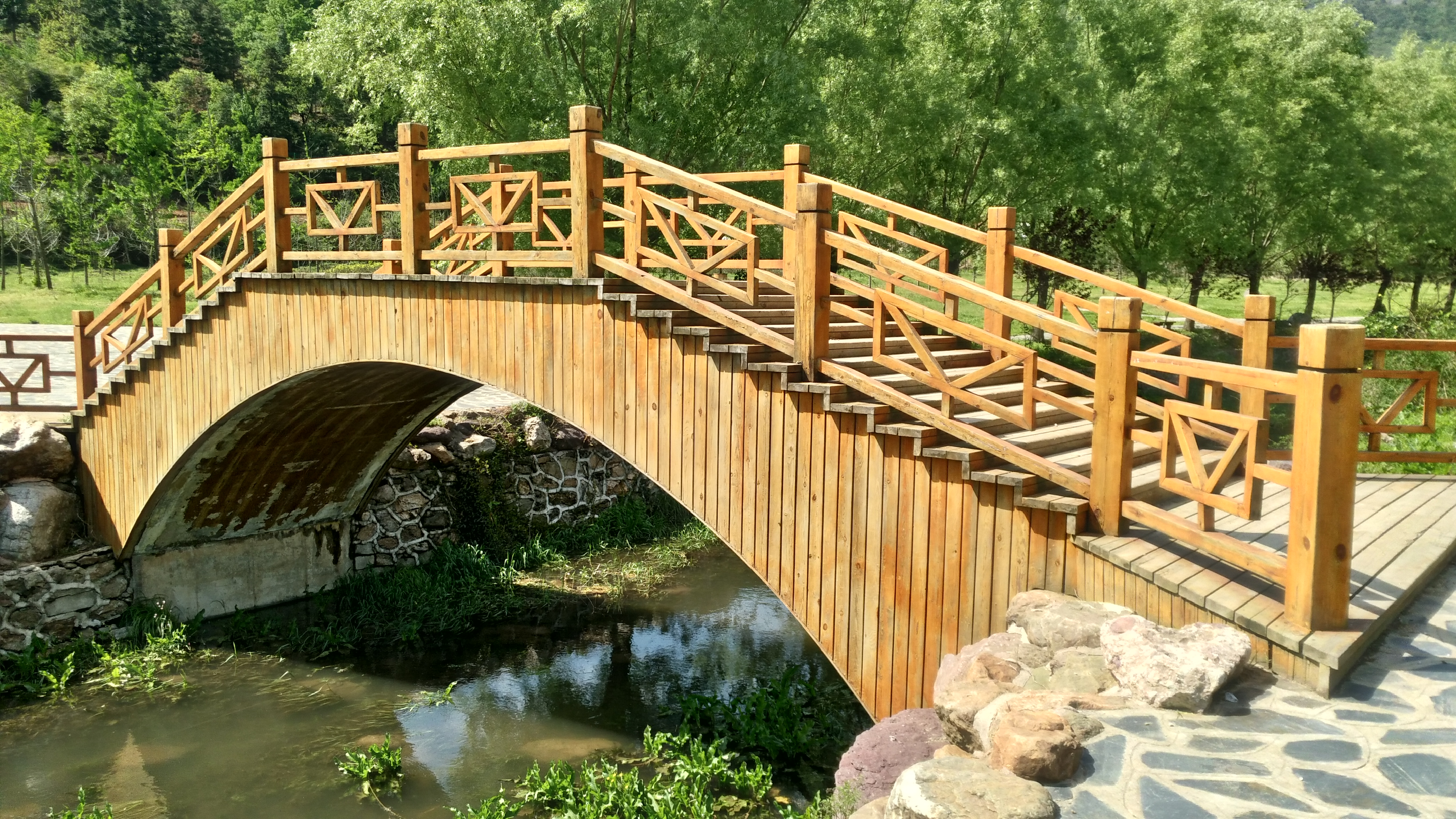 中文（中国大陆）: 这是我旅游的时候拍的照片